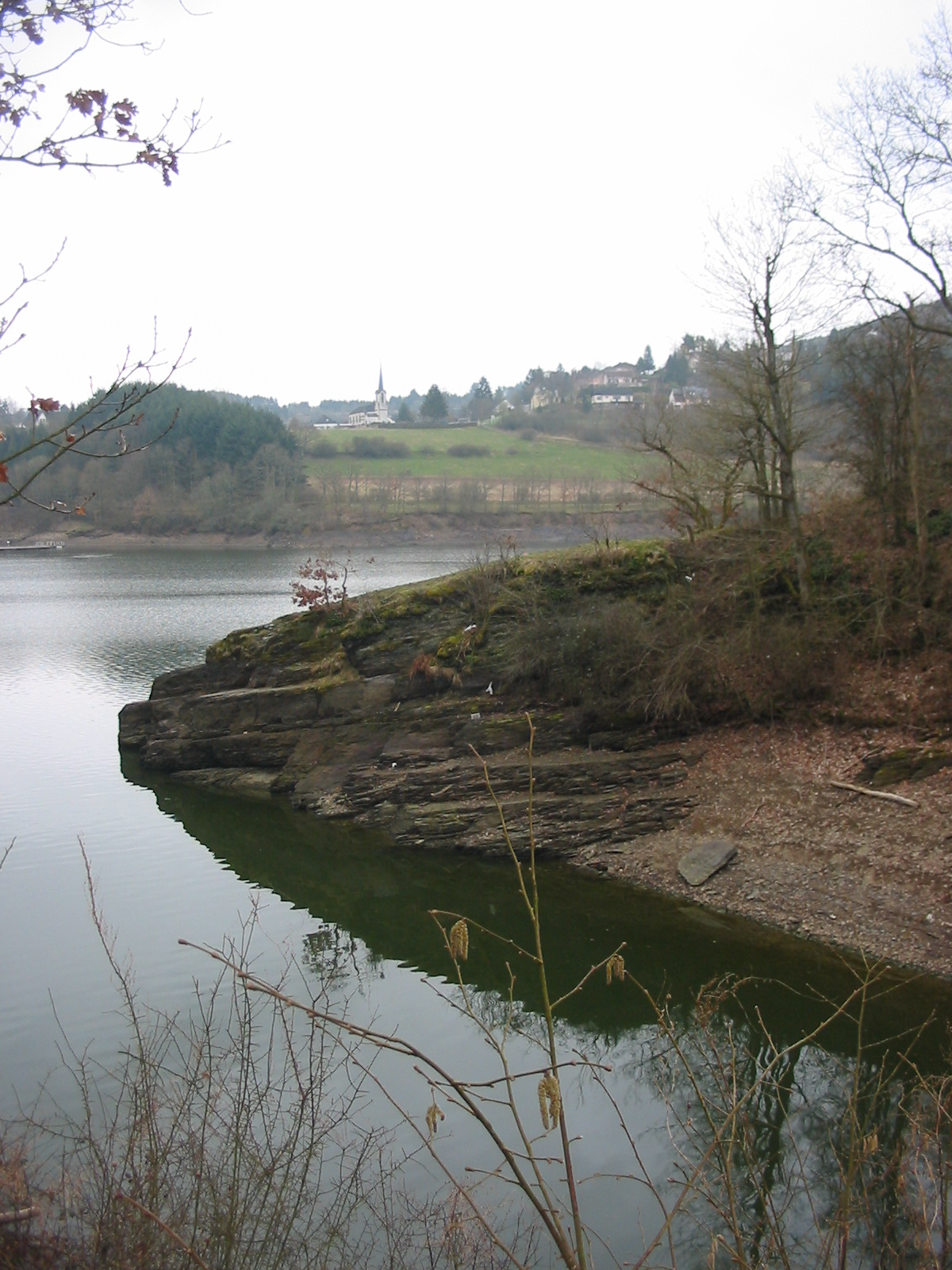 Sauer/Sûre river